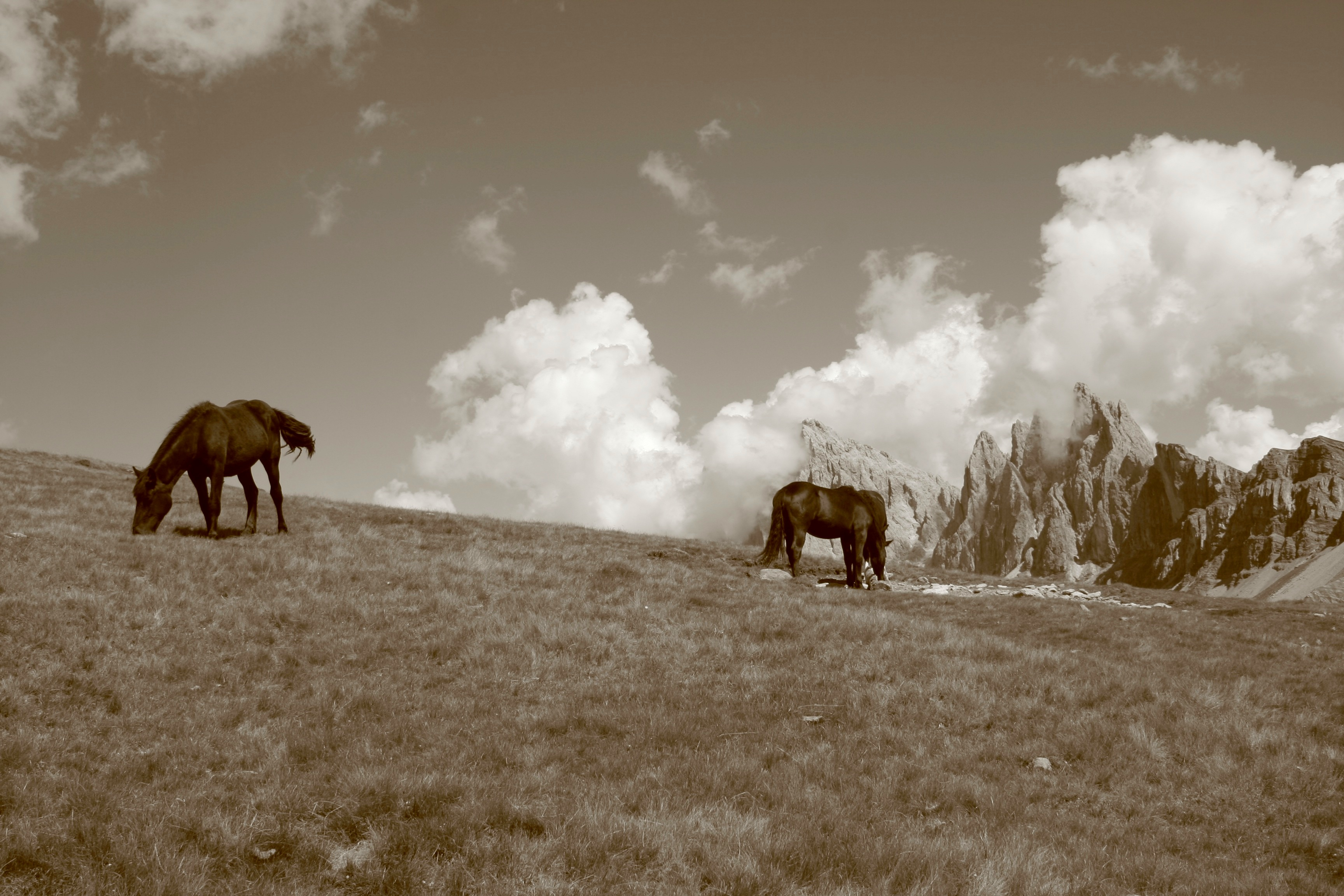 Grasende Pferde auf der Innerraschötzalm